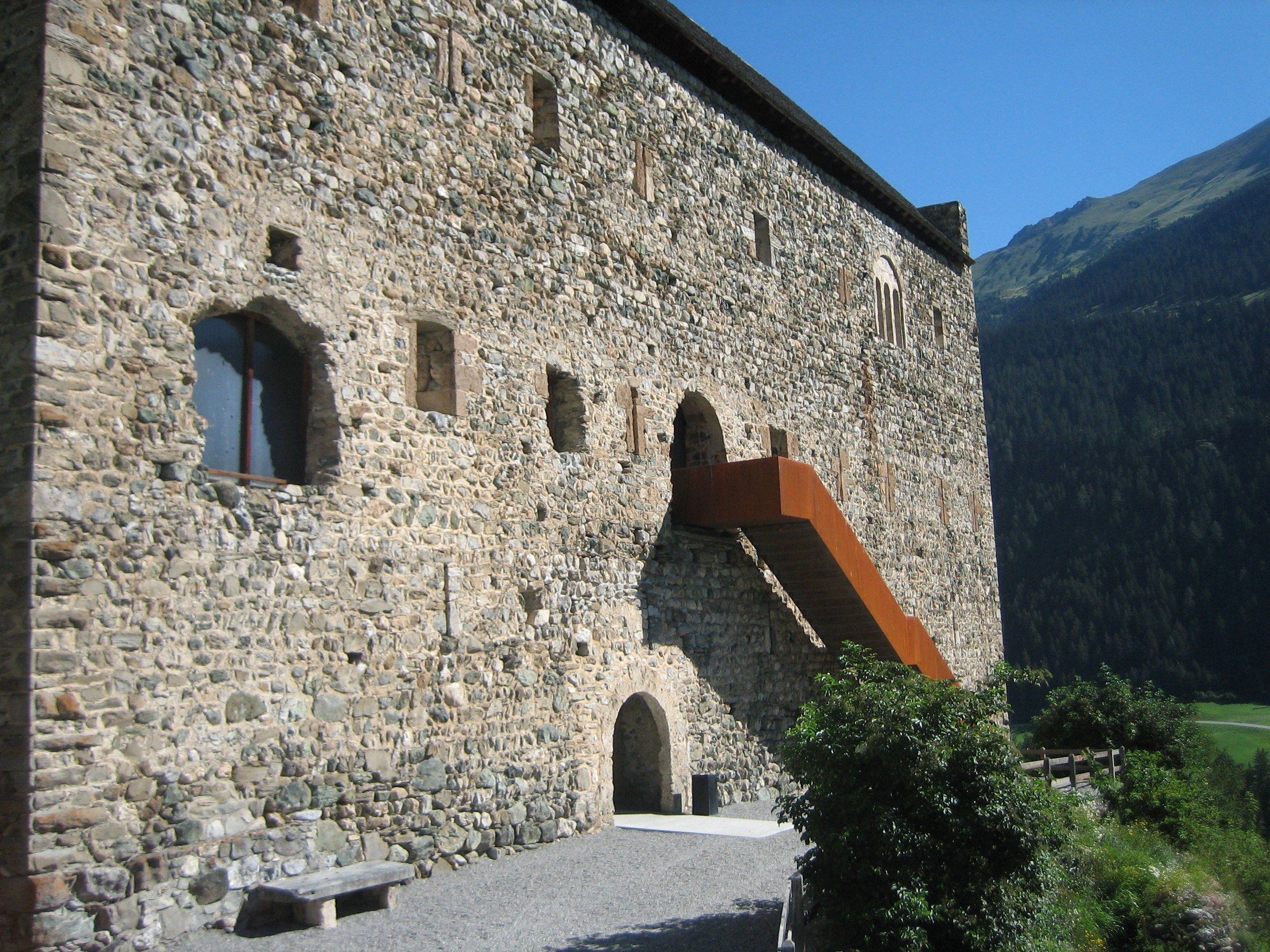 Burg Riom: Südseite des Palas Rumantsch: Casti da Riom: Da mang digl sid digl palaz